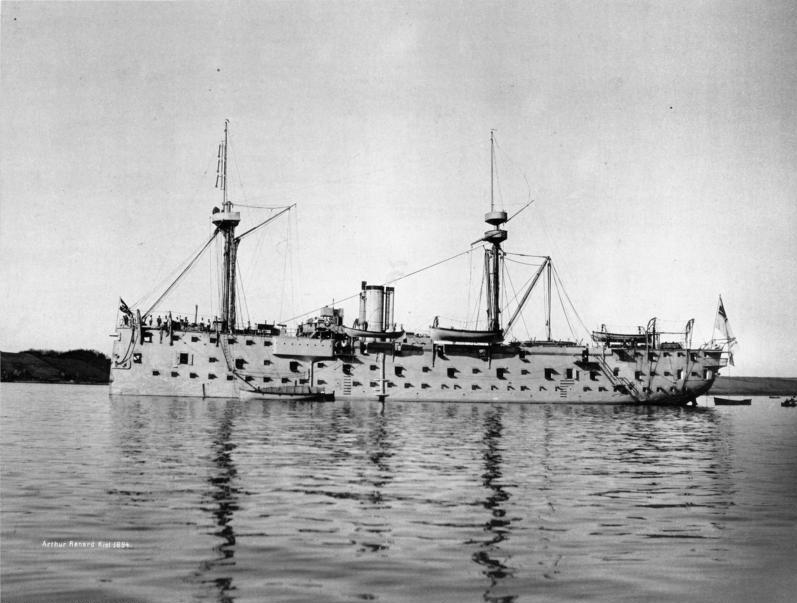 S.M.S. Mars